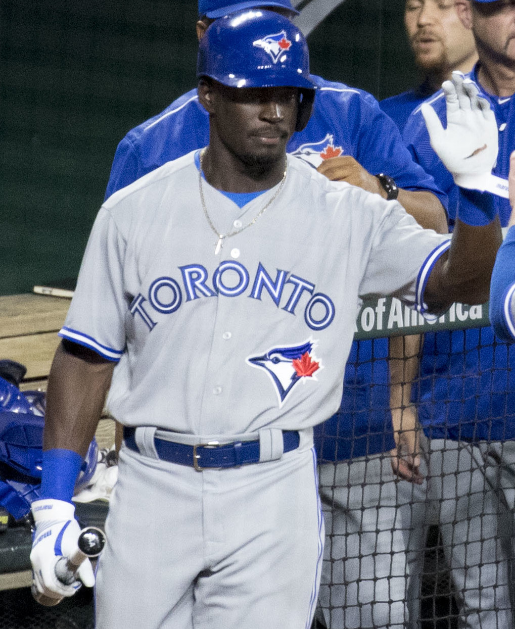 Blue Jays at Orioles 5/19/17